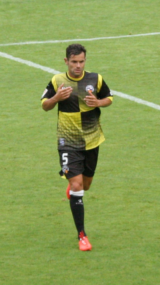 Cristian García Ramos